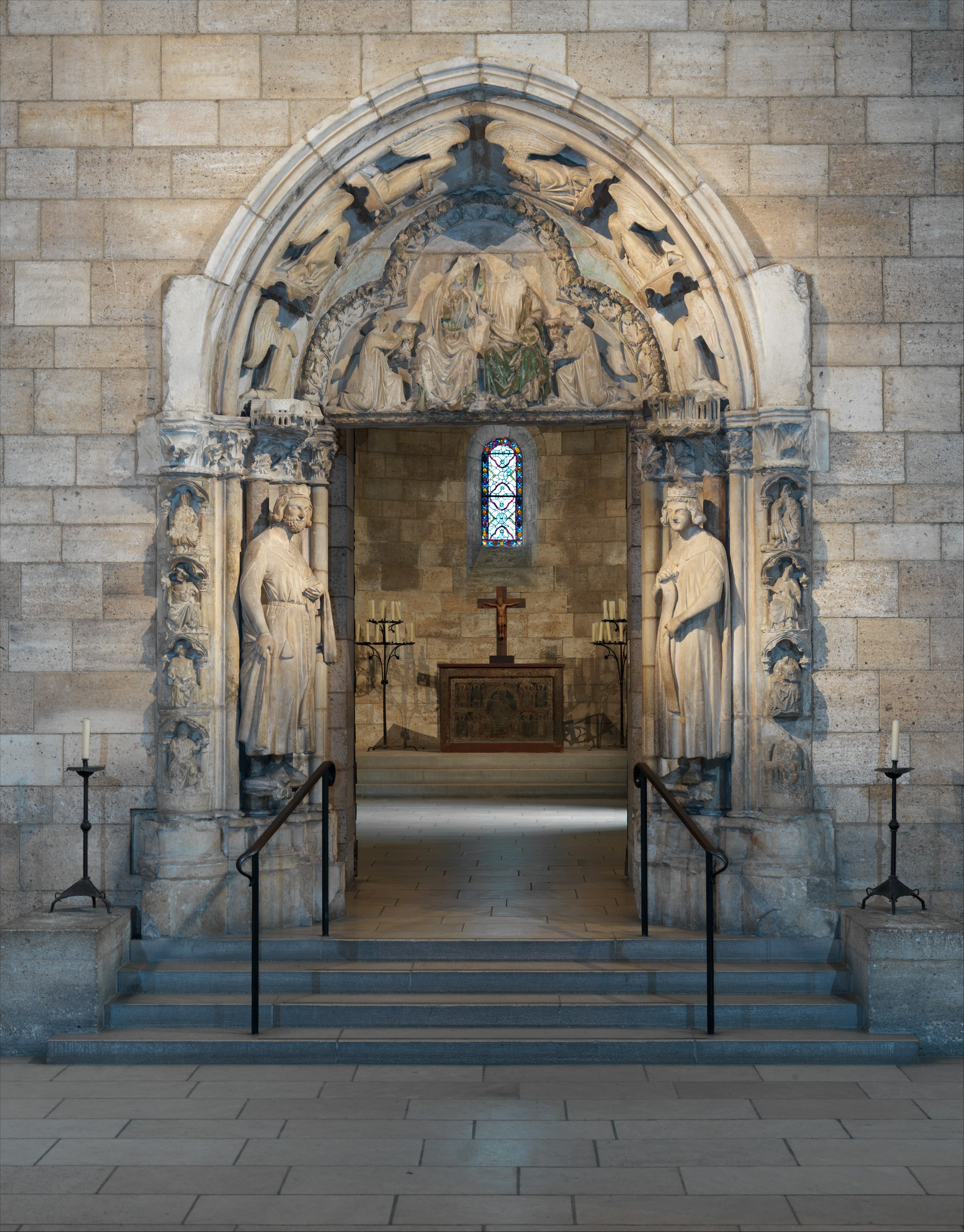 Sculpture-Architectural-Stone